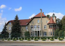 Klasztor Sióstr Salezjanek i Dom Dziecka